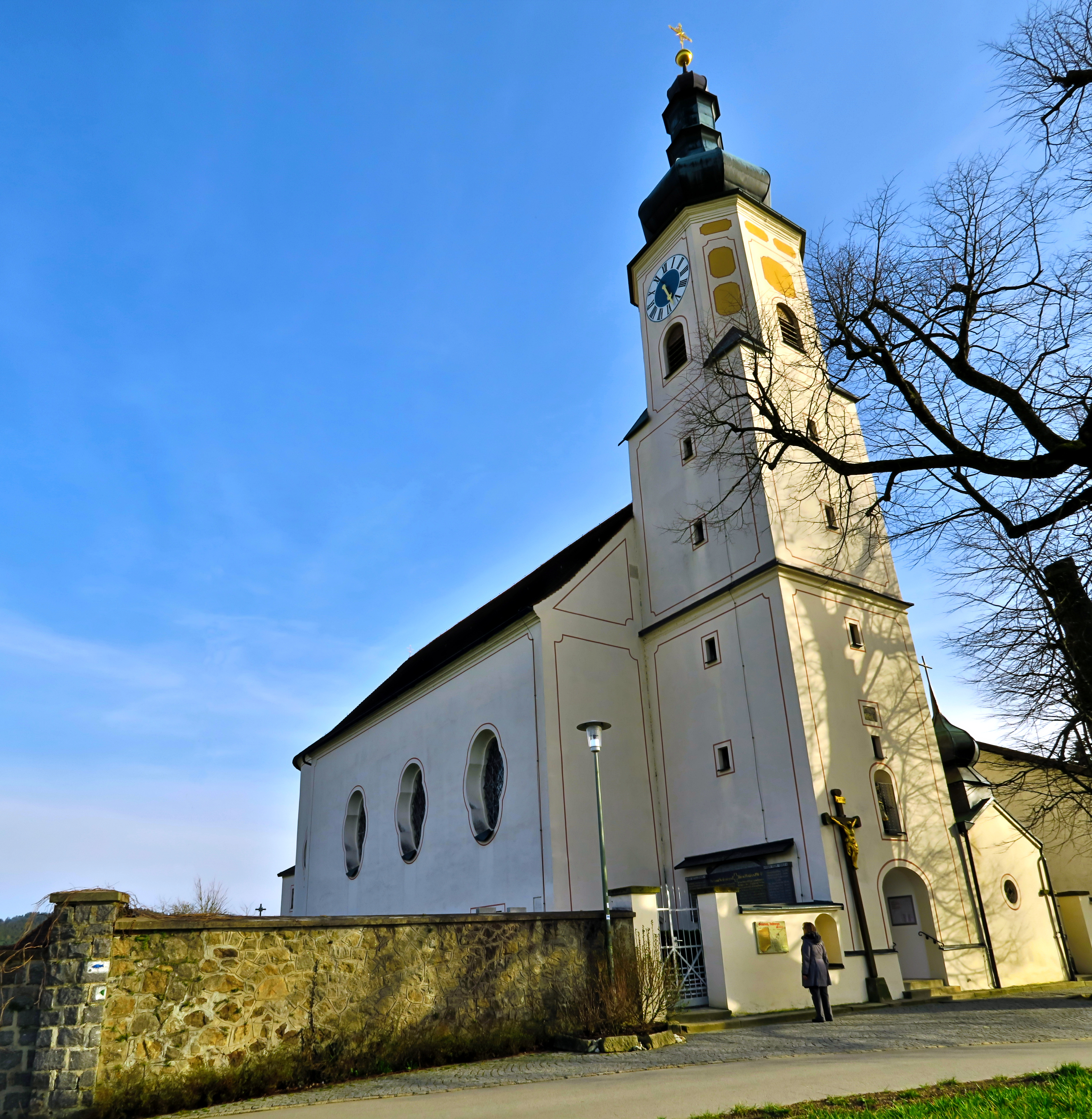 Deutschland, Bayern, Oberpfalz, Cham, Bad Kötzting, Wallfahrtskirche Mariä Himmelfahrt Weissenregen